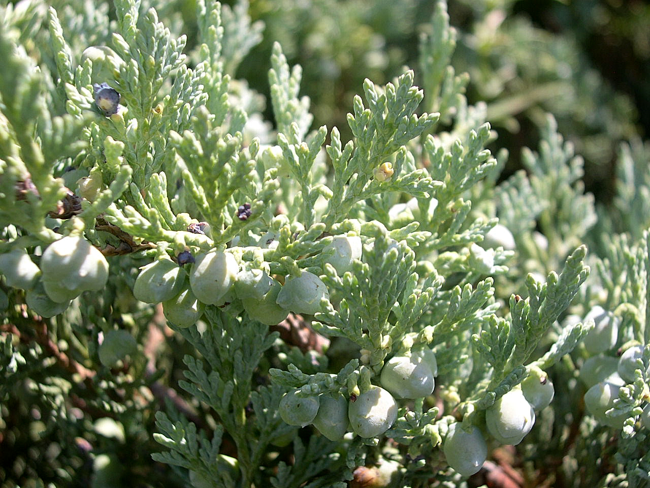 August 18, 2010